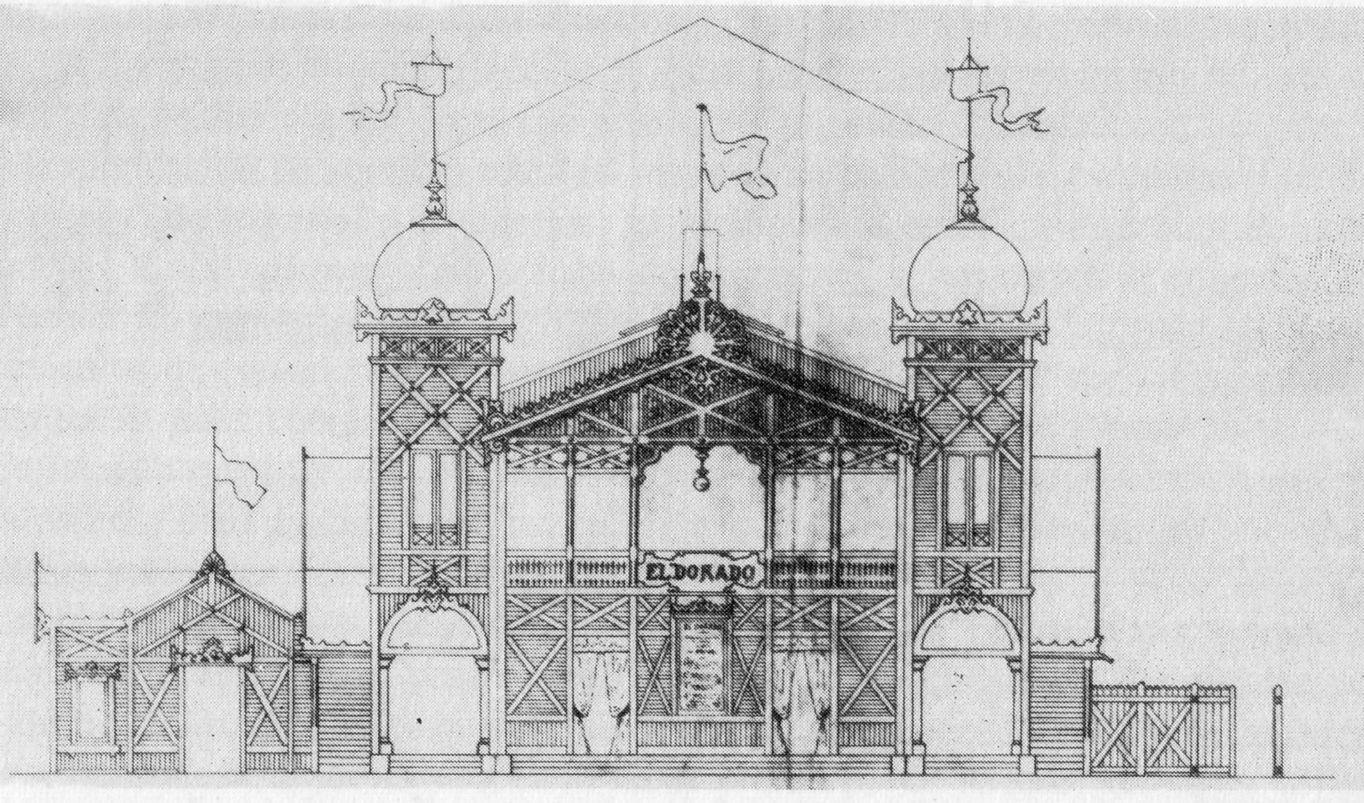 Dibujos del arquitecto José López Sallaberry. Alzado frontal del proyecto para el teatro El Dorado de Madrid (1897). Museo Municipal de Madrid.